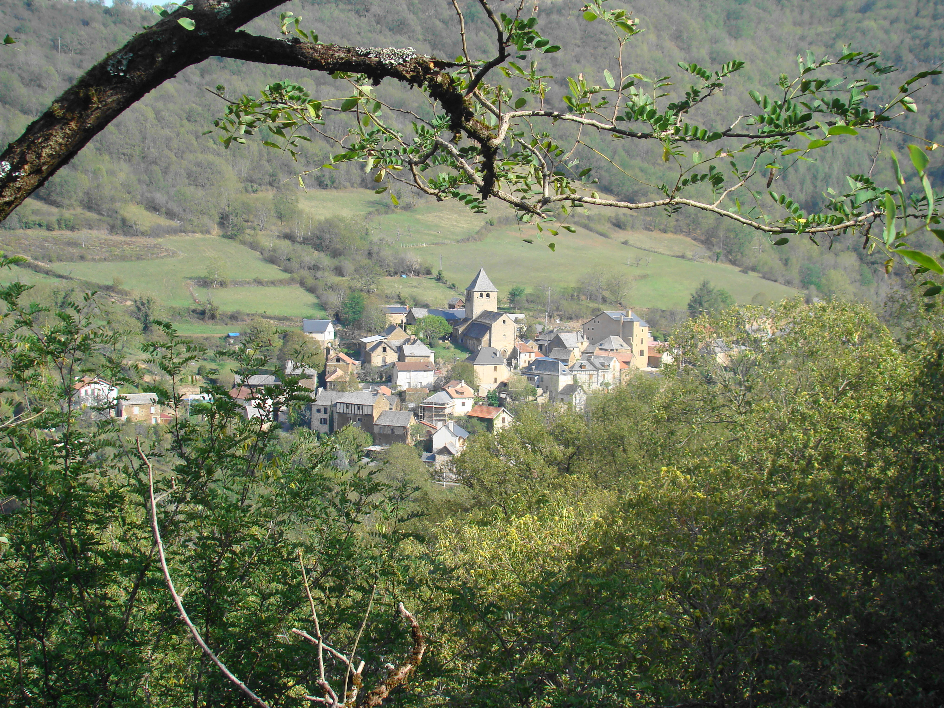 Lagarde-Viaur : vue générale